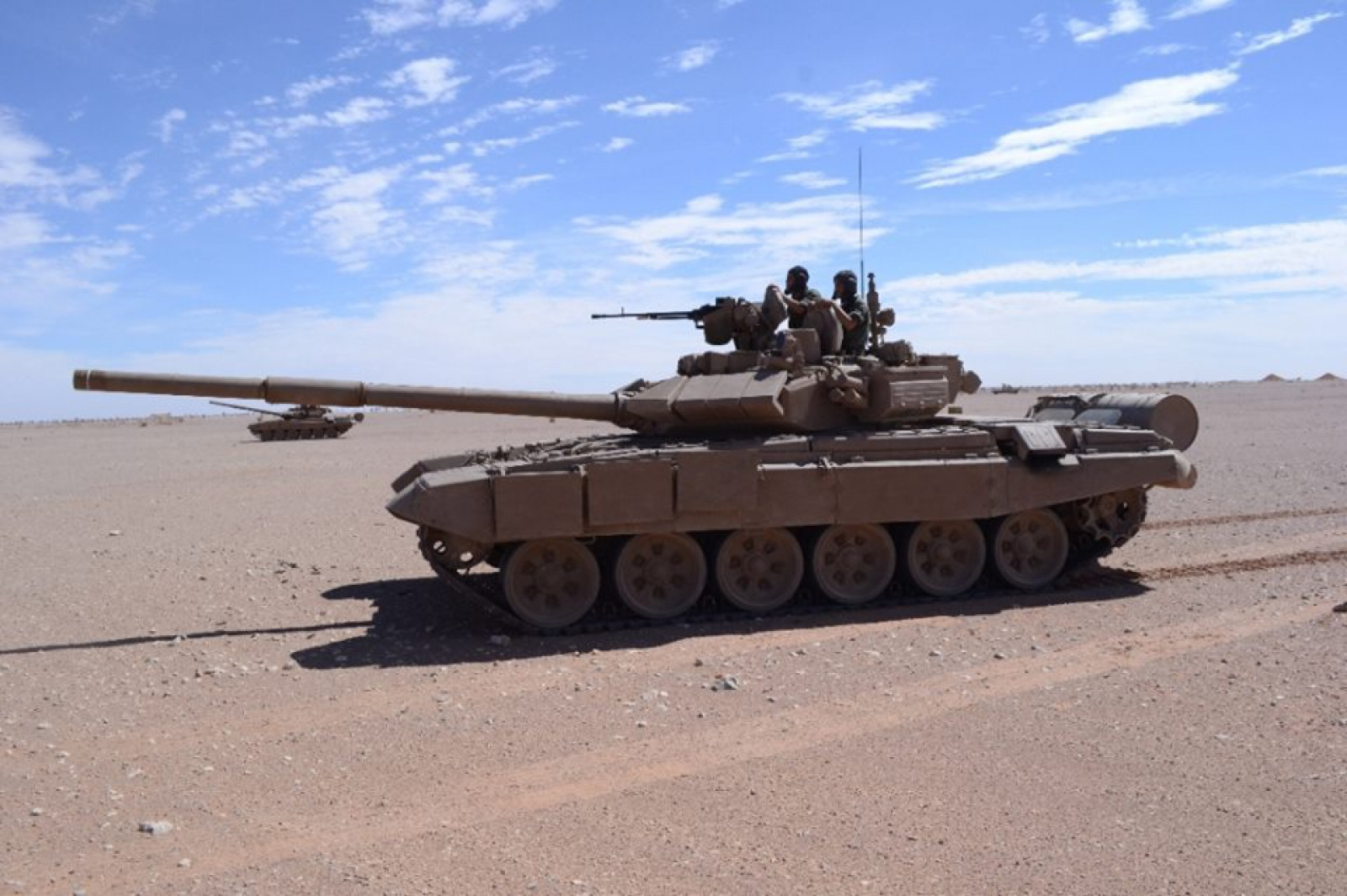 Char d'assaut T-90S de l'armée algérienne durant des exercices de tir réel près de Tindouf, au sud-ouest de l'Algérie.